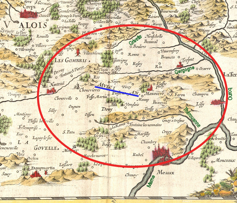 pays entre Brie et Valois